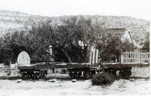 Un par de vagones planos en Pto. Pirámides, uno tiene sus términos semi circulares.